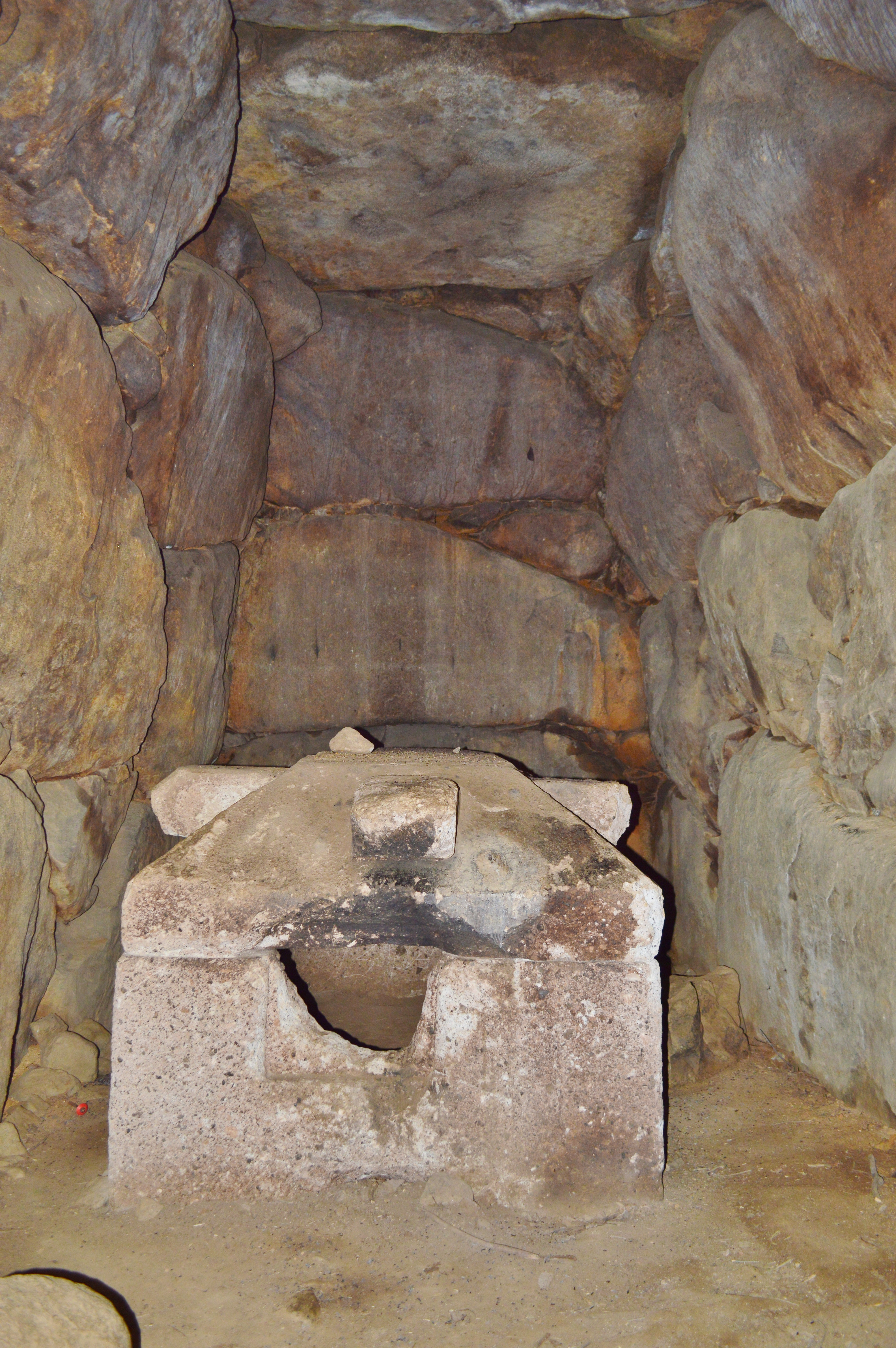 赤坂天王山古墳 石室玄室